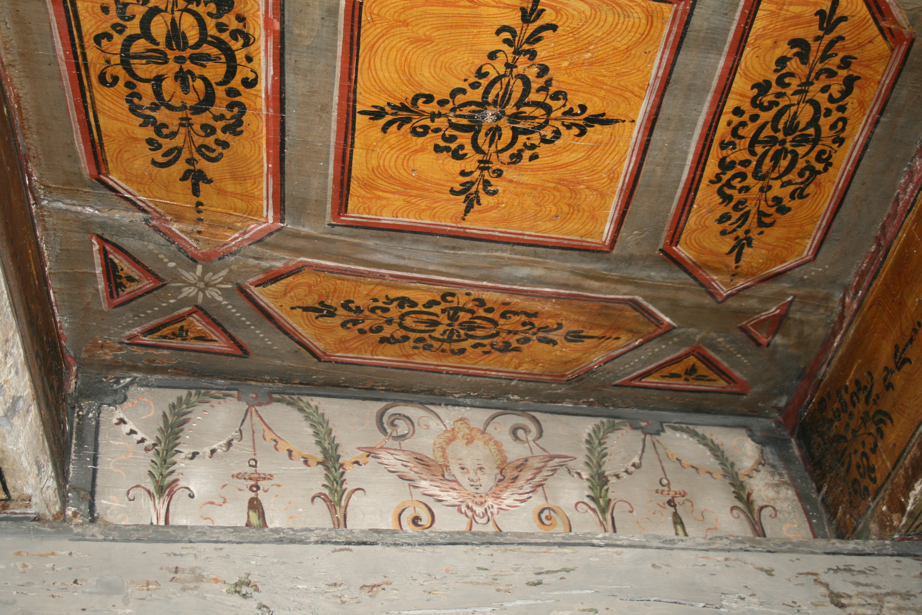 Decken- und Wandmalerei von 1606 im 2. Obergeschoss